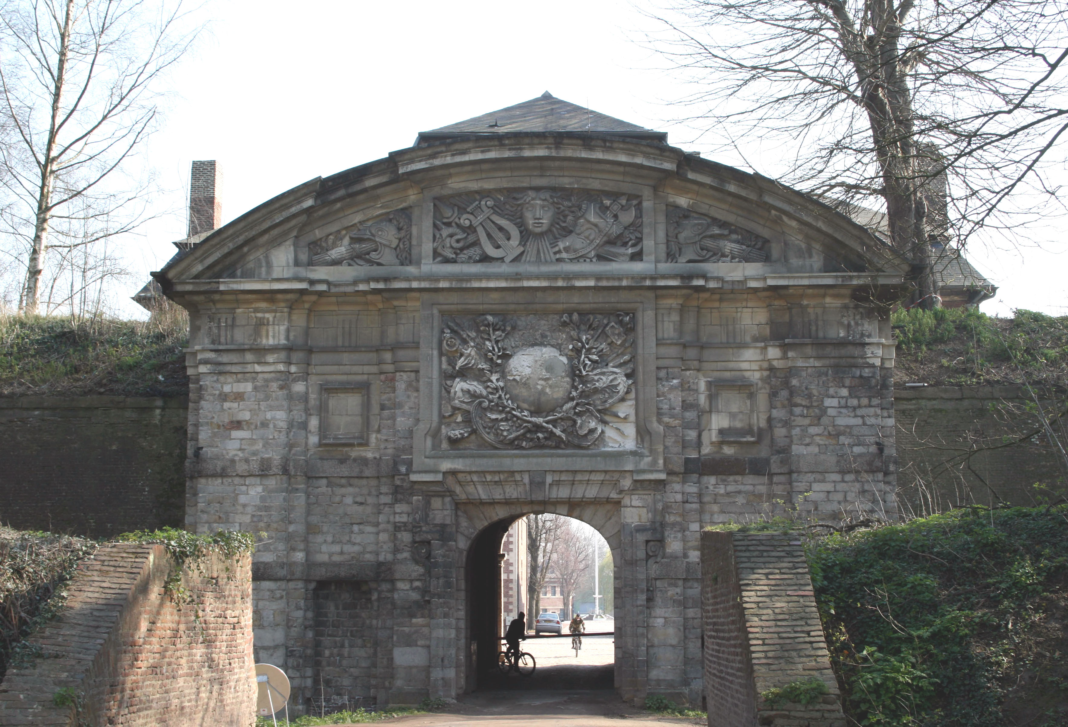 Porte Dauphine dans la Citadelle Vauban à Lille